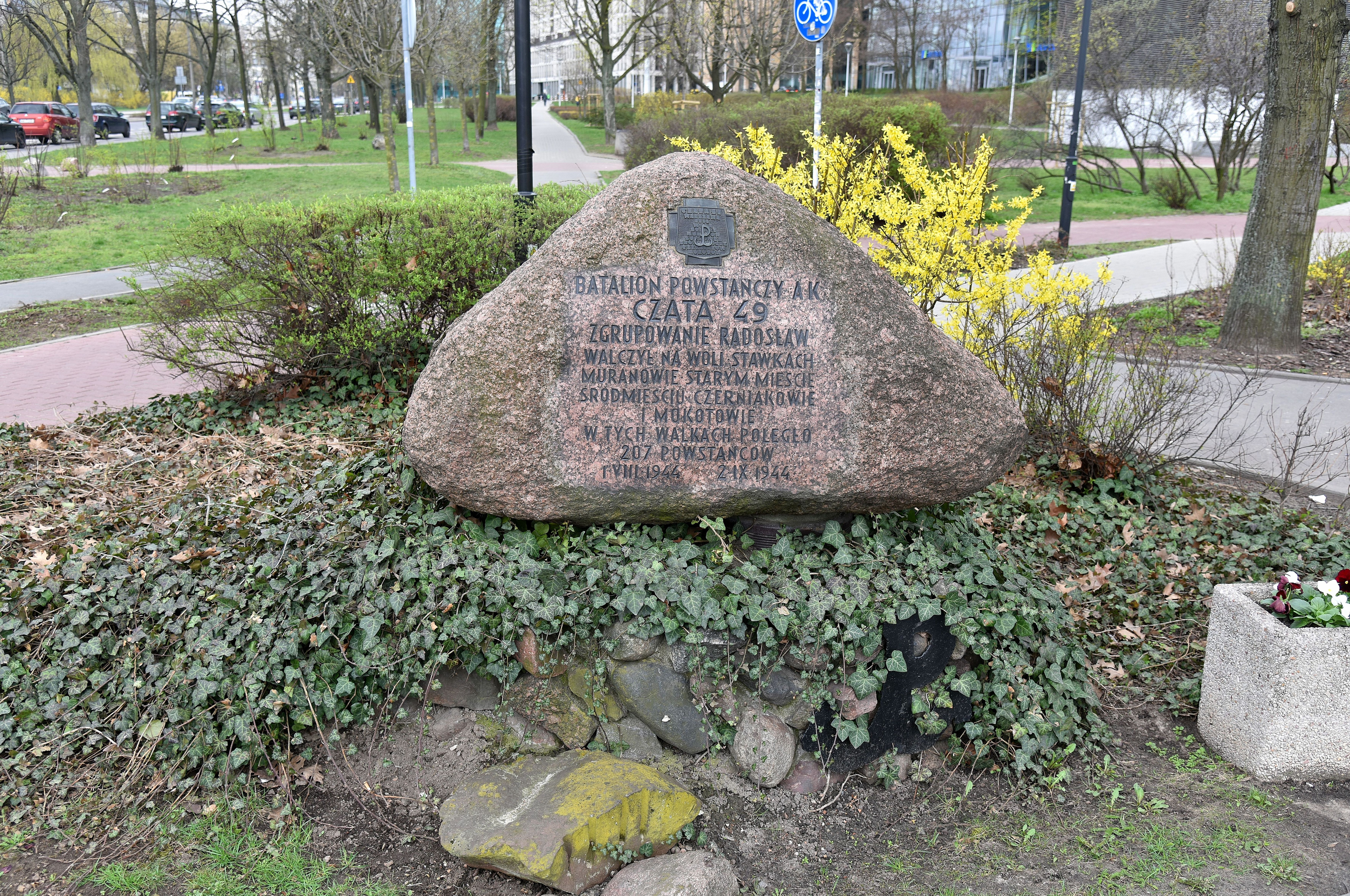 Kamien upamiętniający natalion Czata 49 w Warszawie